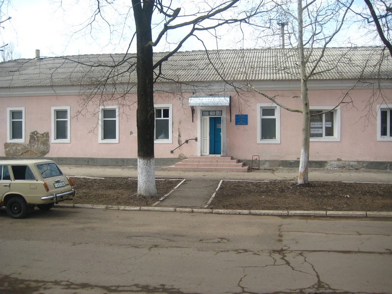 Бывшая баня Стемковского